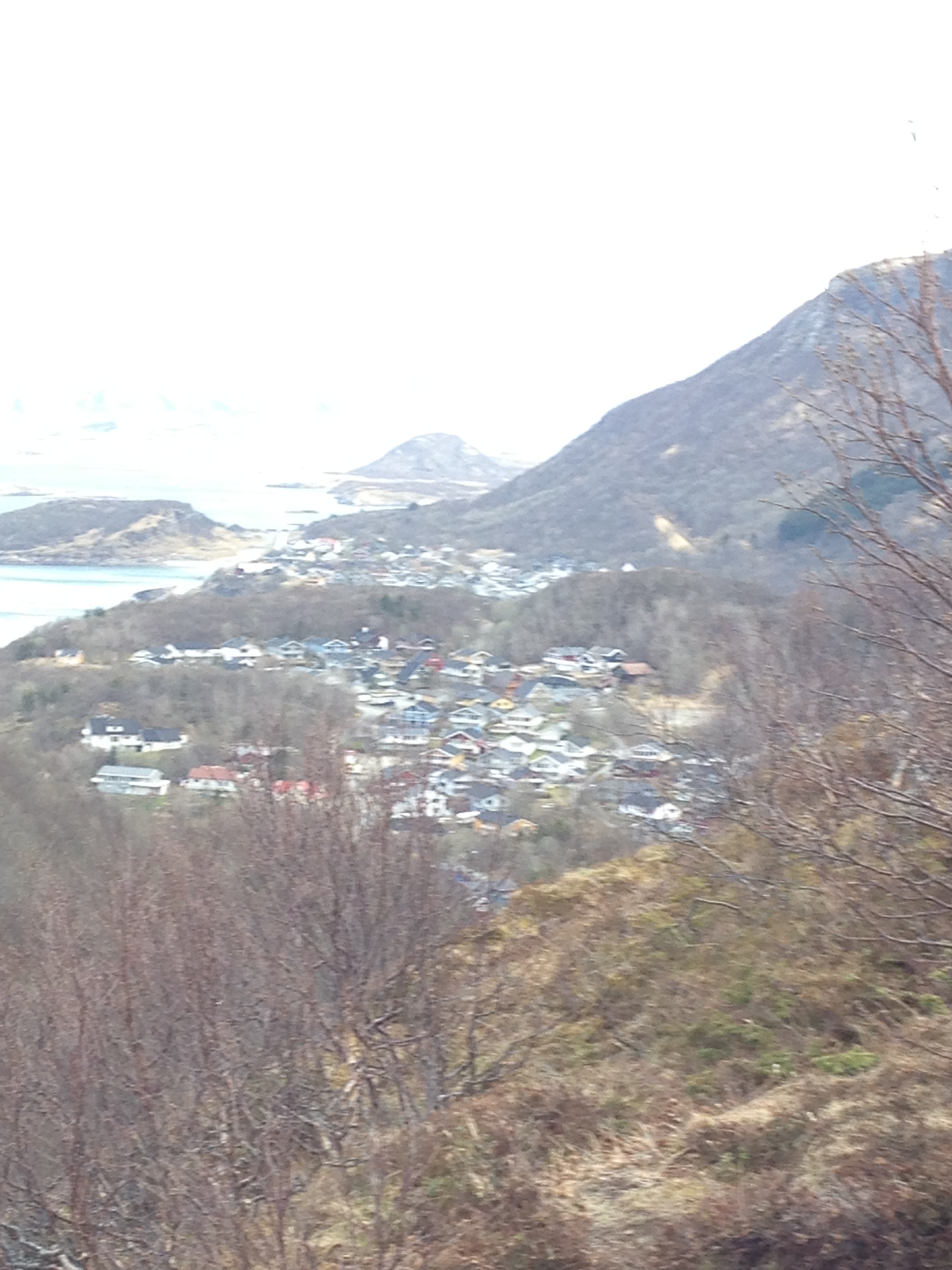 Løpsmarka, et tettsted rett utenfor Bodø by.